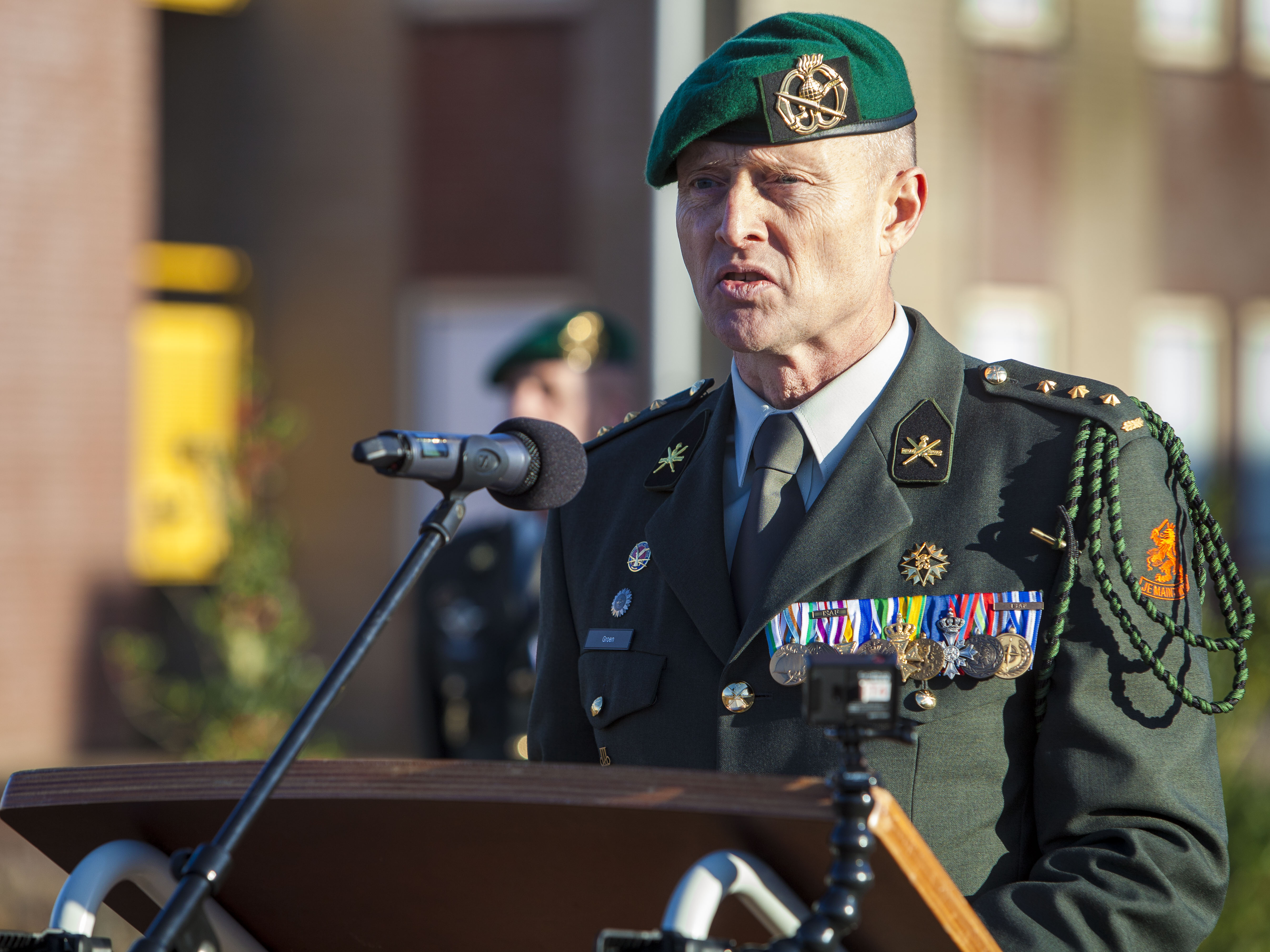 Kolonel Jelte Groen heeft vanmiddag het commando over het Korps Commandotroepen (KCT) overgenomen van ranggenoot Jan Swillens. De nieuwe commandant van de groene baretten deed voor zijn aantreden op de De Engelbrecht van Nassaukazerne in Roosendaal ruimschoots operationele ervaring op.